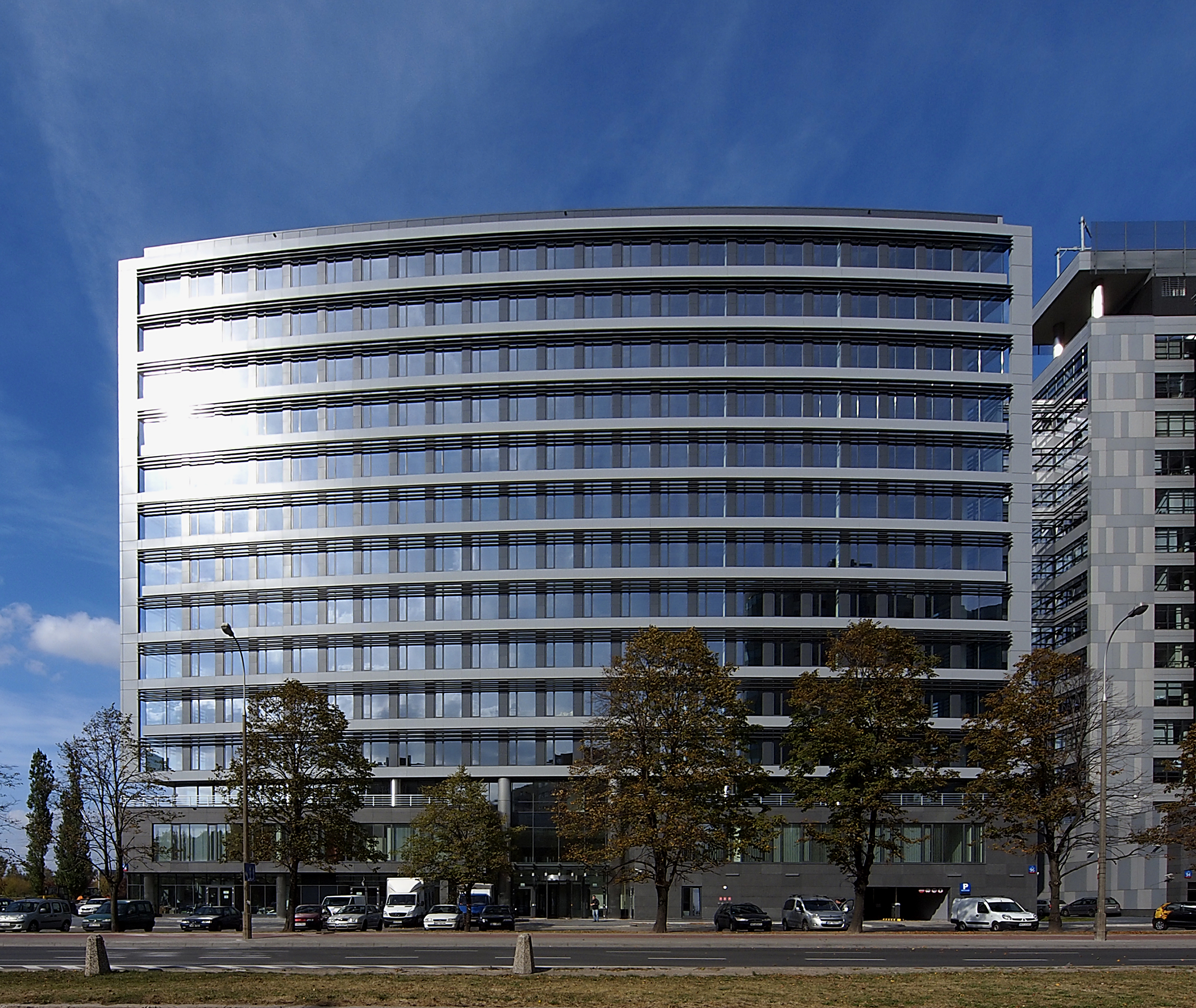 Siedziba Wydawnictw Szkolnych i Pedagogicznych sp. z o.o.